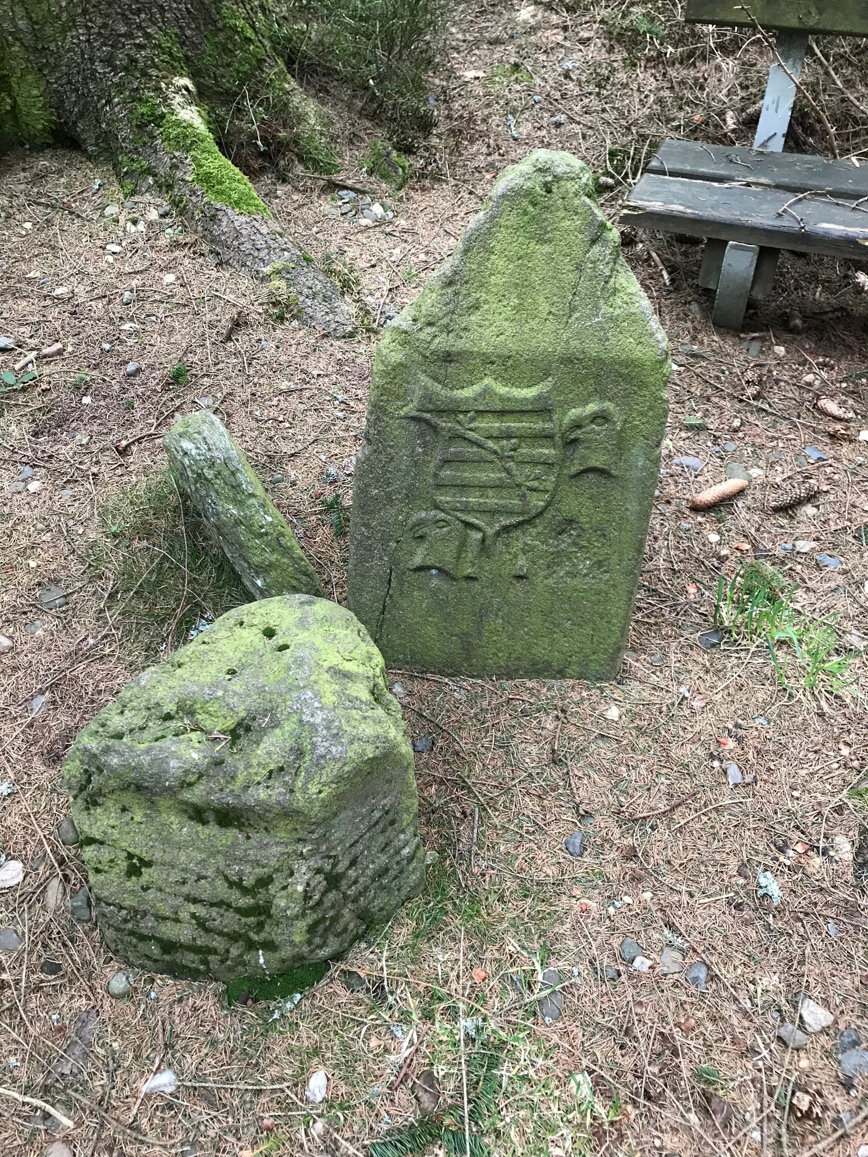 Dreilagenstein im Geyerschen Wald (2018)